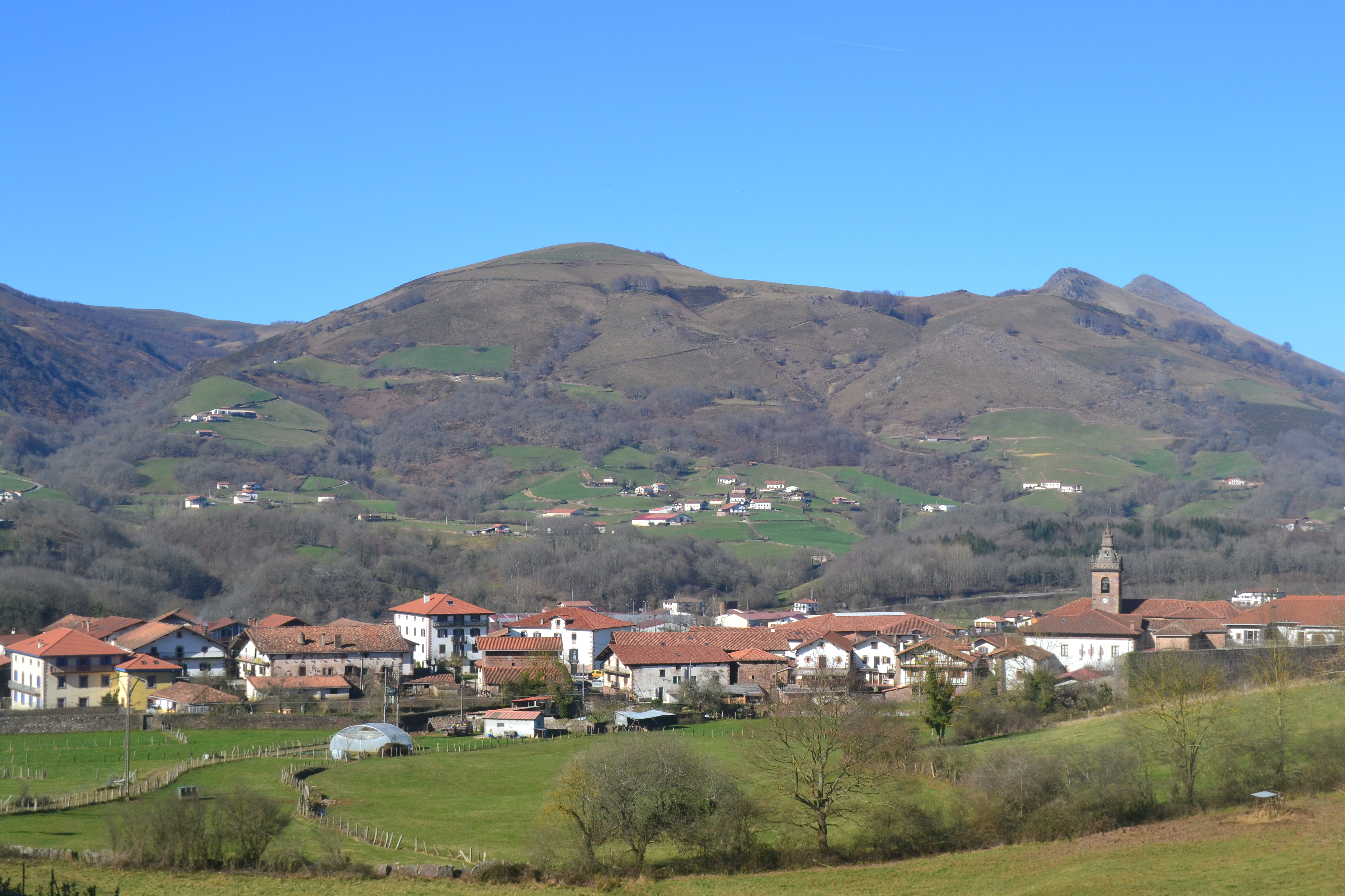 Arizkun, Baztan. Navarra, España. Arizkun, Baztan. Navarre, Spain.